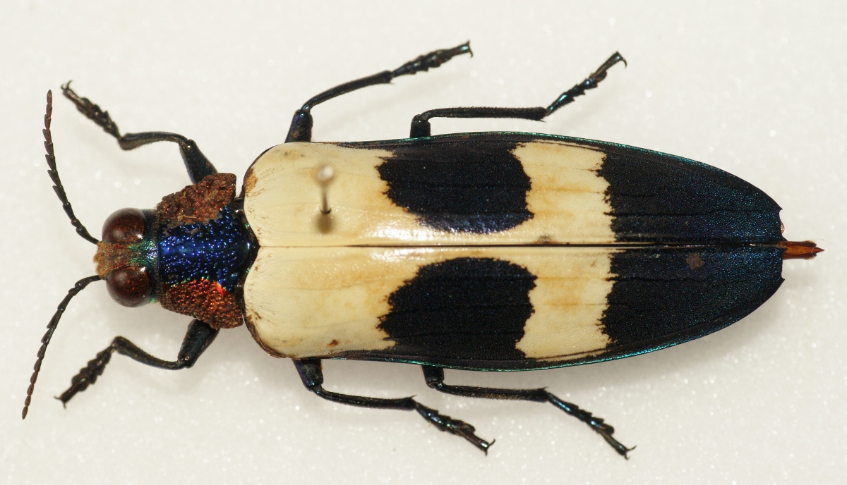 Buprestidae - In collection